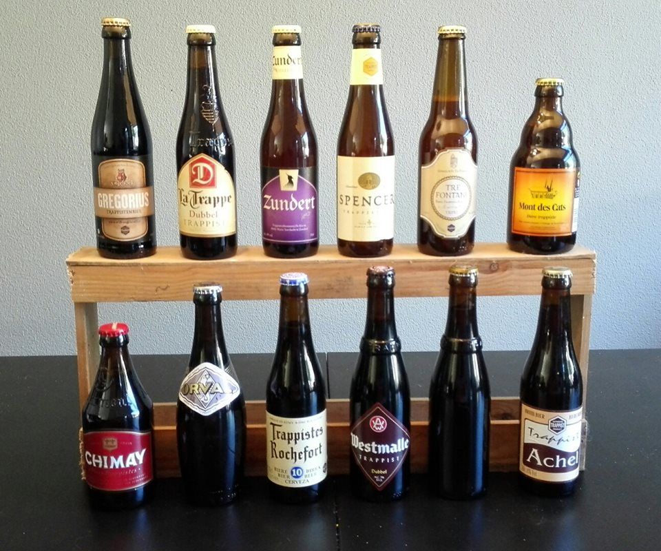 Alle 11 erkende trappistenbieren en 1 niet erkende (Mont des Cats).